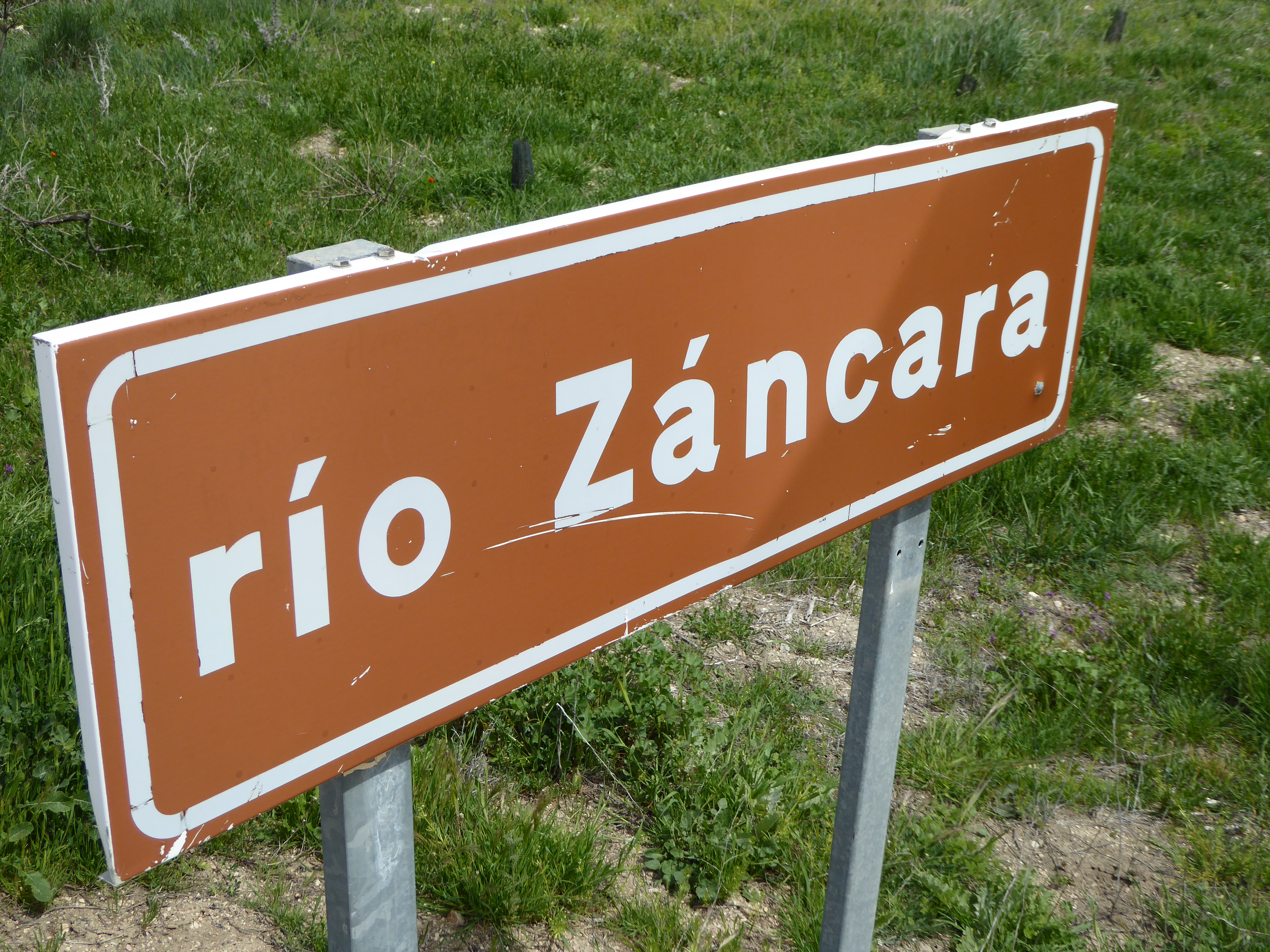 Río Záncara en el Molino de la Angostura, en Las Pedroñeras.